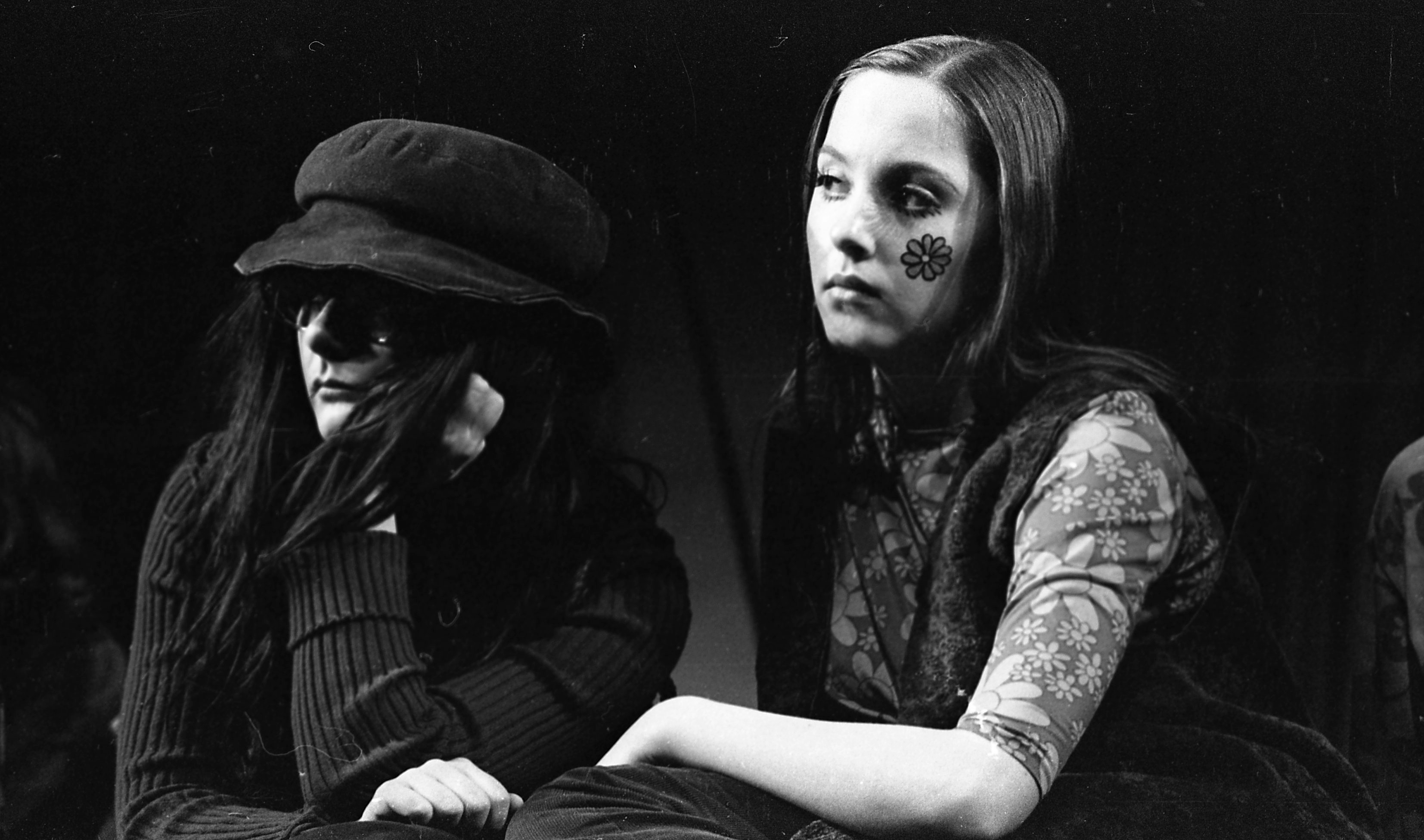 Vígszínház, a Képzelt riport egy amerikai popfesztiválról című musical előadása, Béres Ilona és Egri Márta. Location: Hungary, Budapest XIII. Tags: Budapest Title: Vígszínház, a Képzelt riport egy amerikai popfesztiválról című musical előadása, Béres Ilona és Egri Márta.